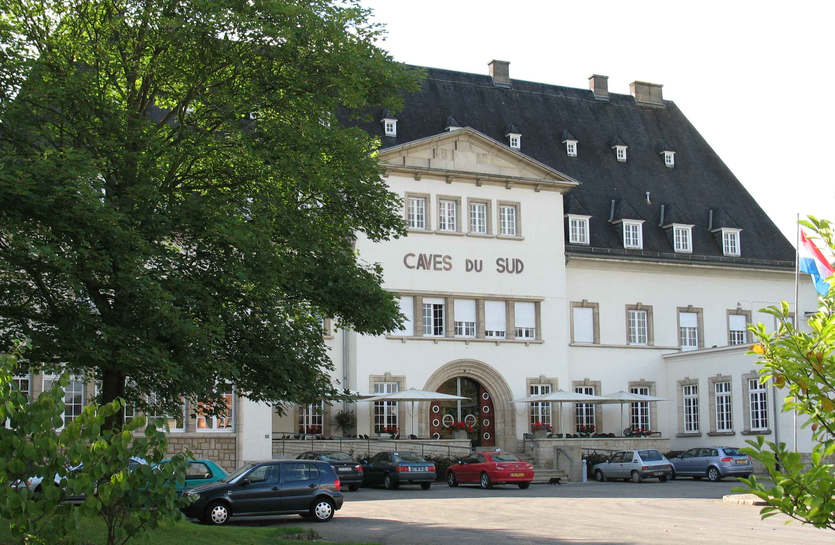 Sujet: D'Kellerei zu Remerschen.